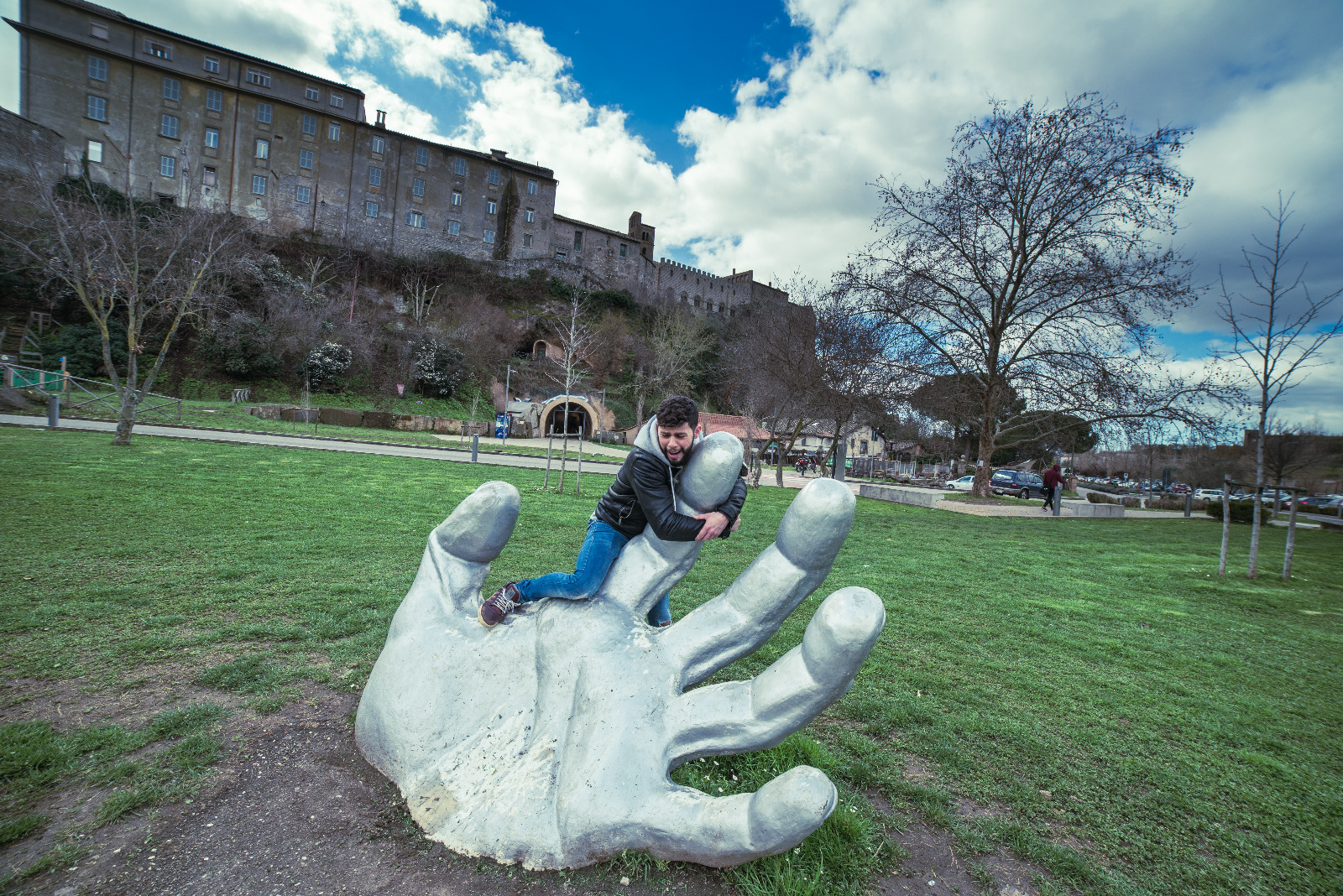 The awakening (Viterbo). Foto di Alberto Pitrola. Attore Angelo Misseri.